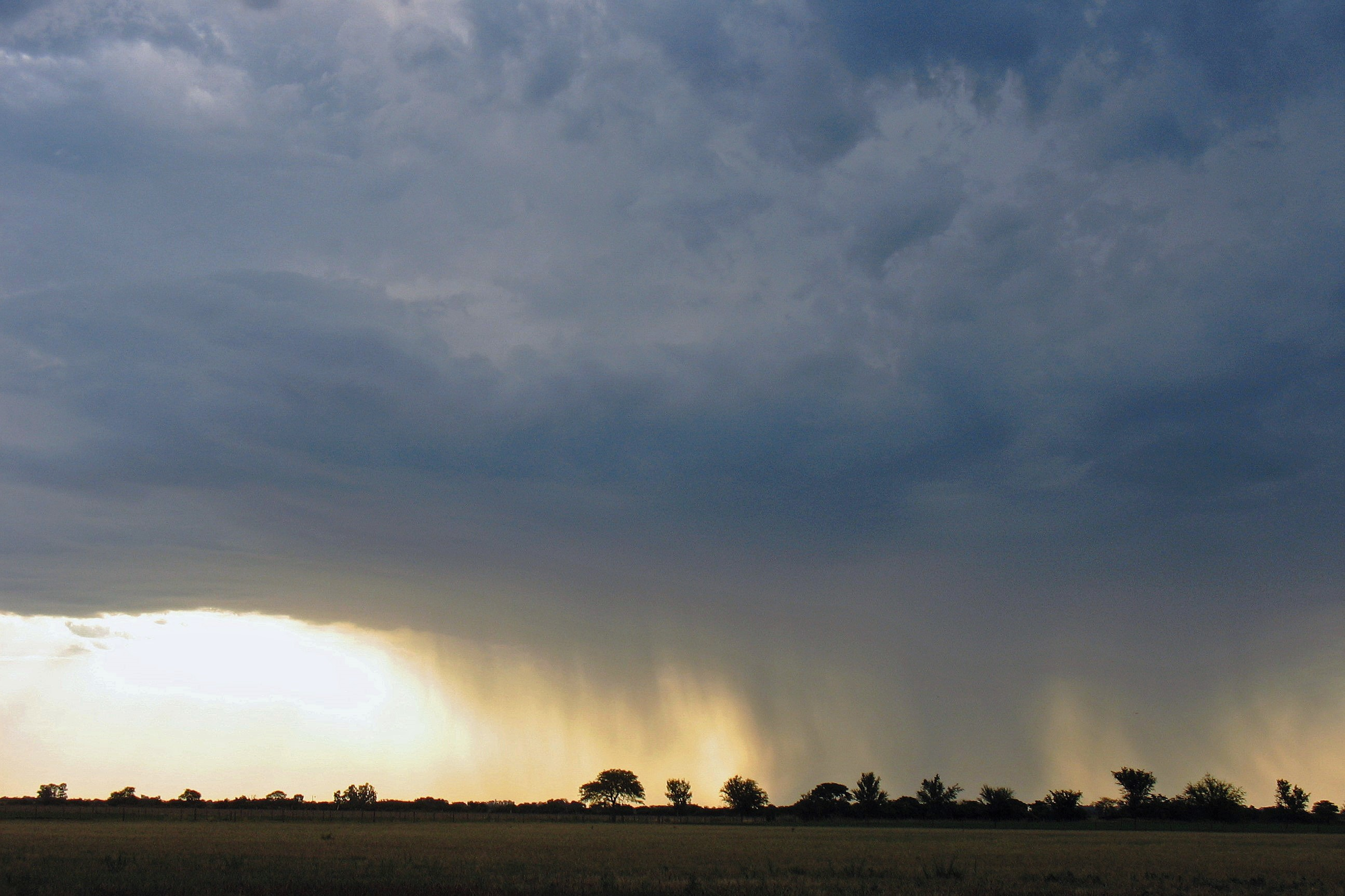 Testimonio gráfico de fenómeno meteorológico